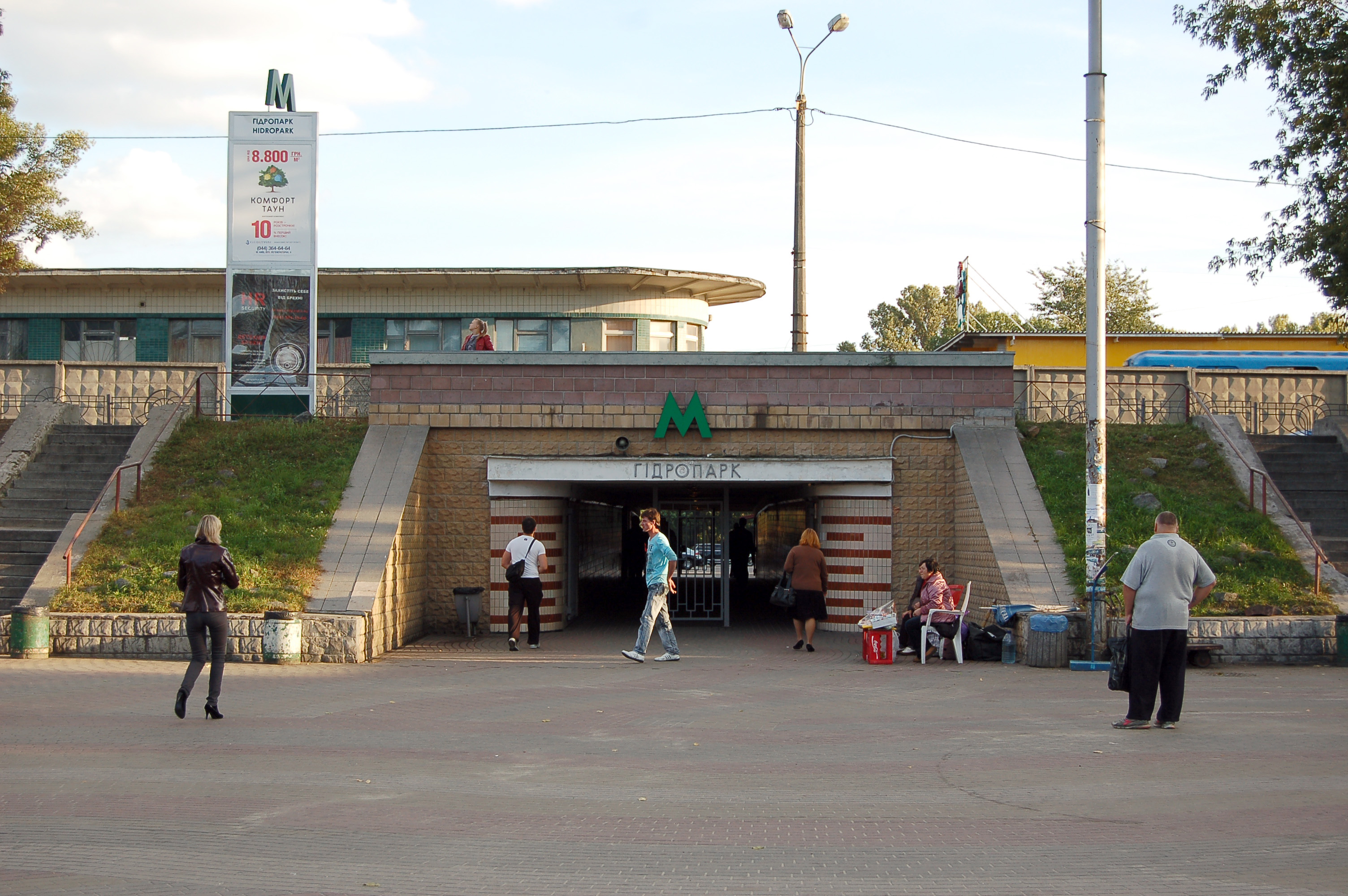 Станция метро «Гидропарк», северо-западный вход